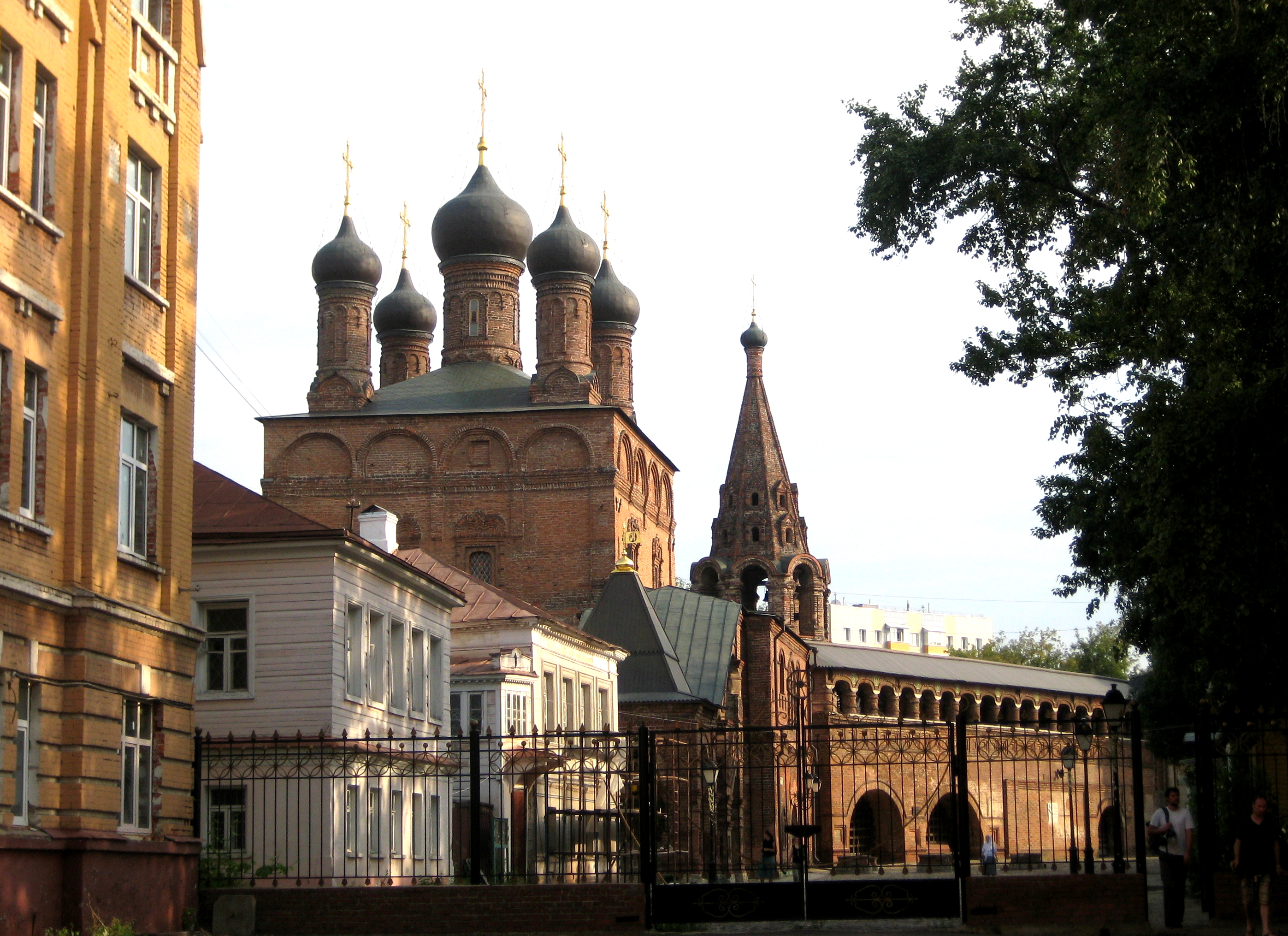 Крутицкое подворье